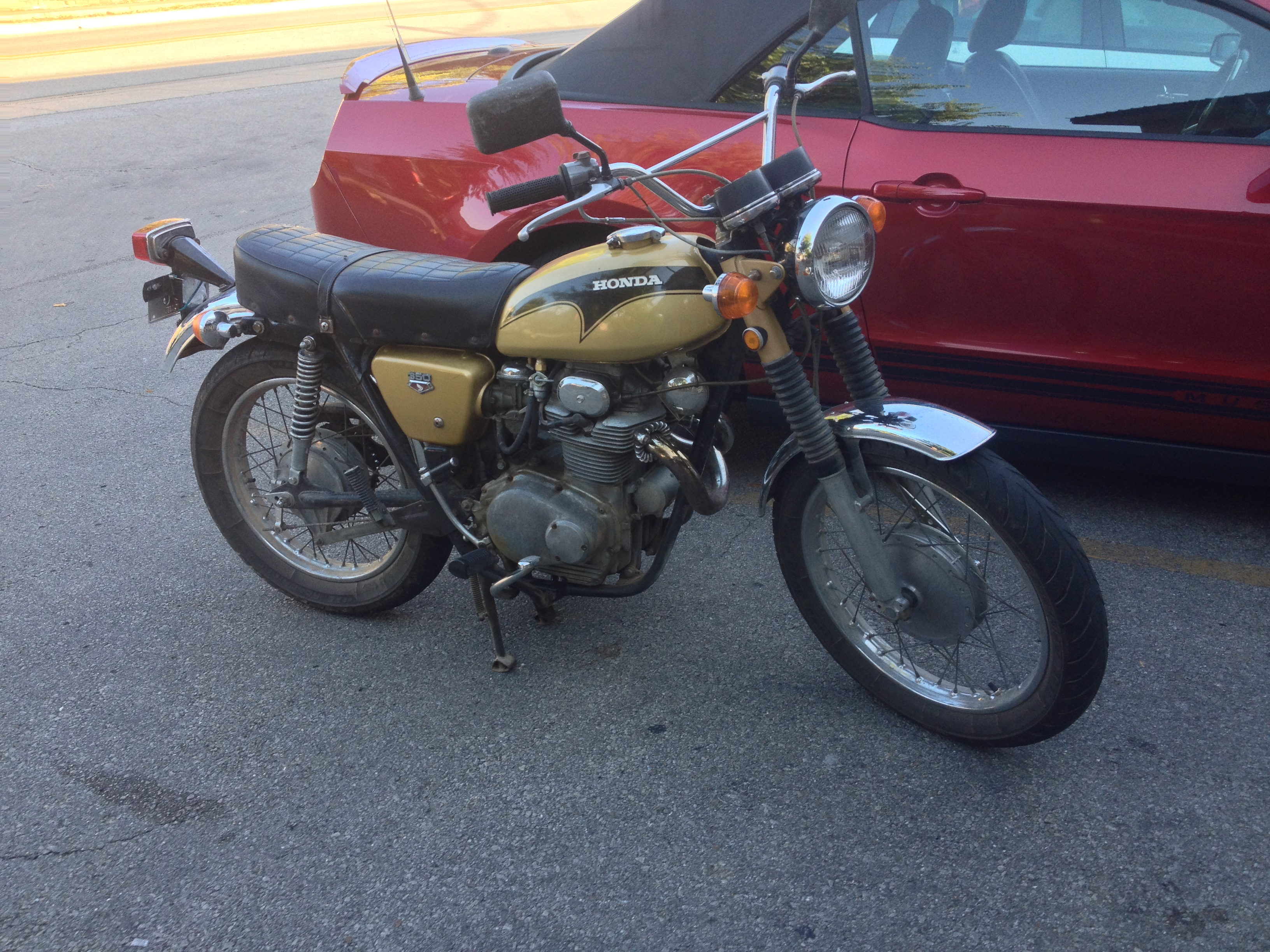 Fayetteville Arkansas USA